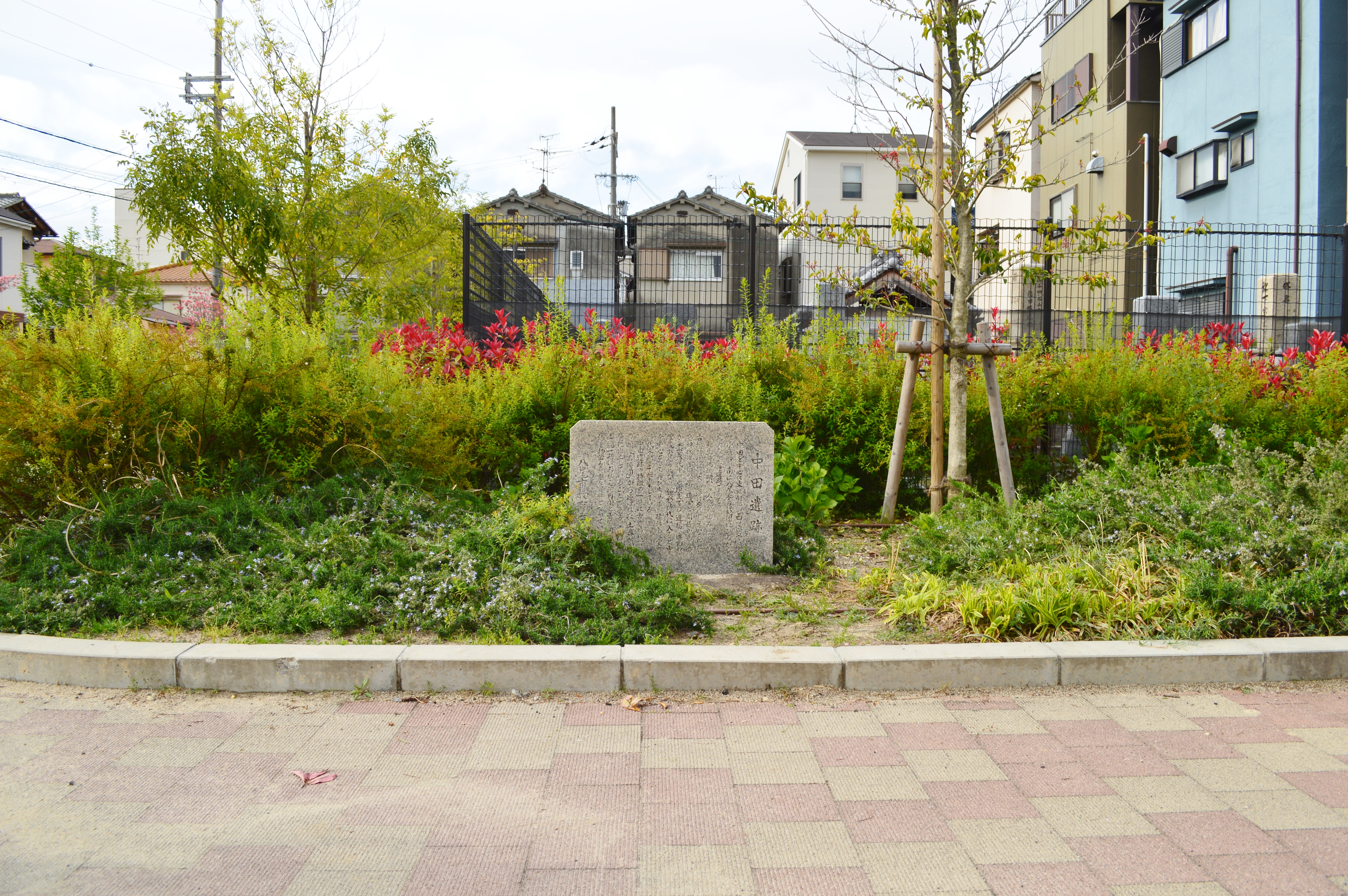 中田遺跡 (八尾市) 石碑